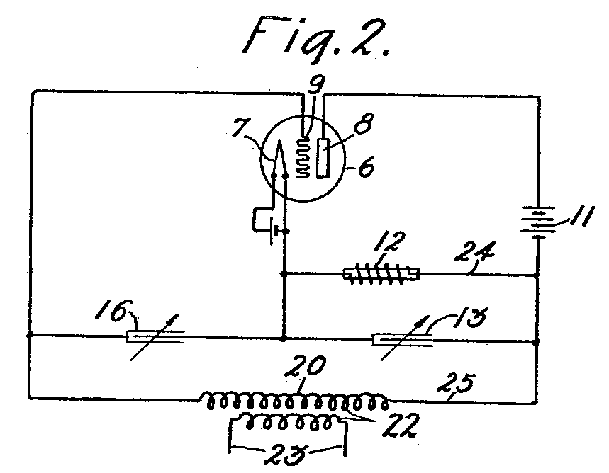 Colpitts Oszillator Patentschrift Fig. 2